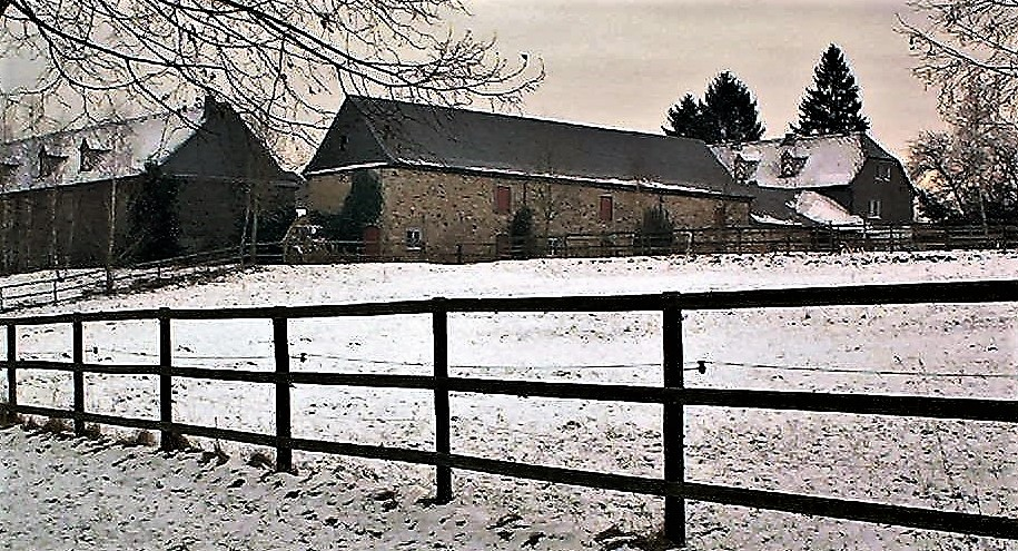 The courtyard of Dernbach, built in 1815 AD.